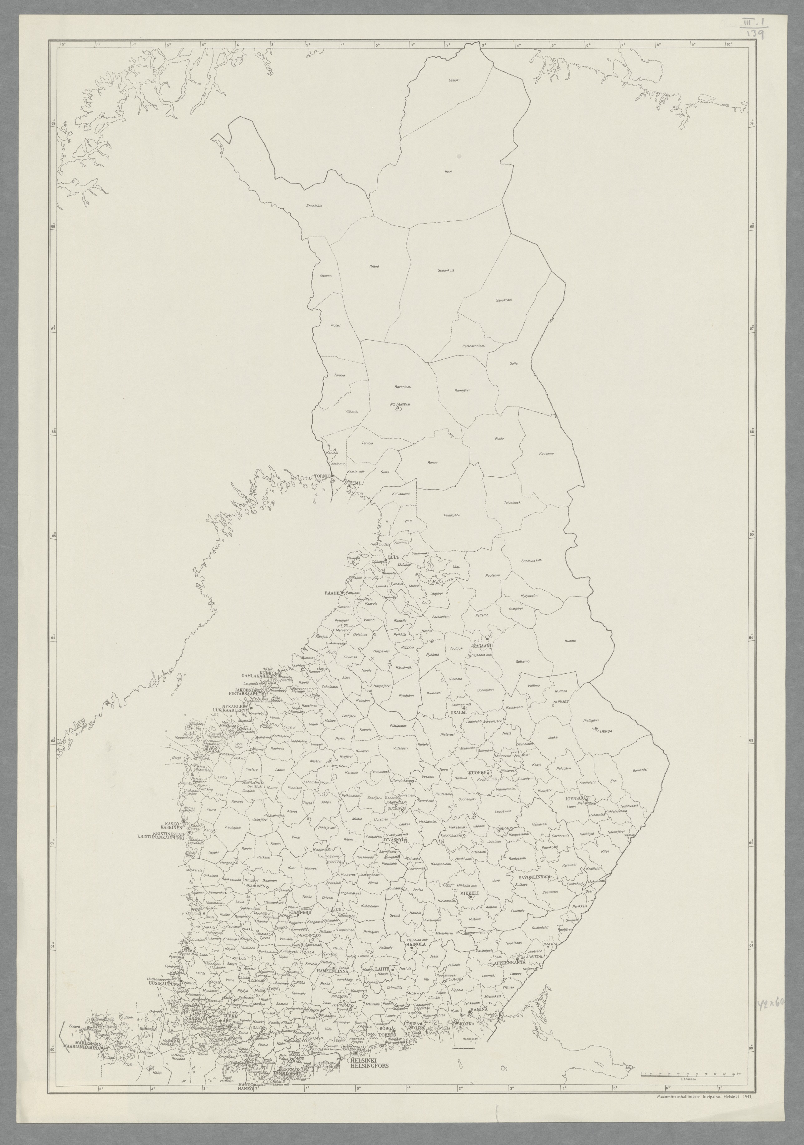 Suomi, tilastokartta 1947: Kuntajaot